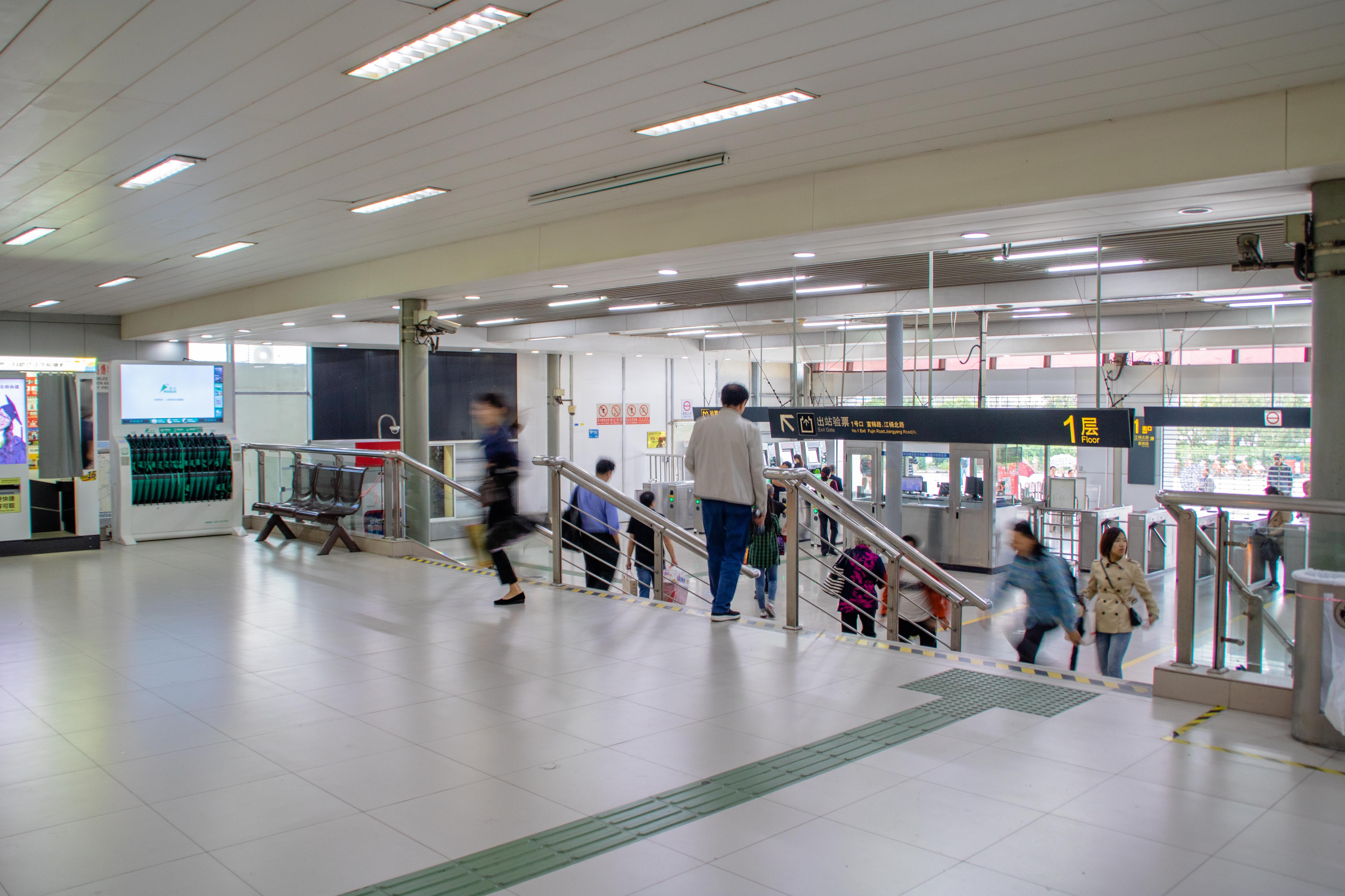 江杨北路站站厅